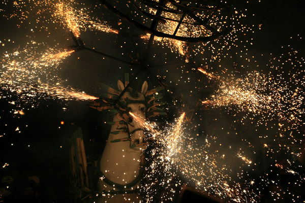 Cavallo di fuoco. Foto di Umberto Marconi.